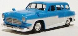 Grell model van een Sachsenring P240 Kombi